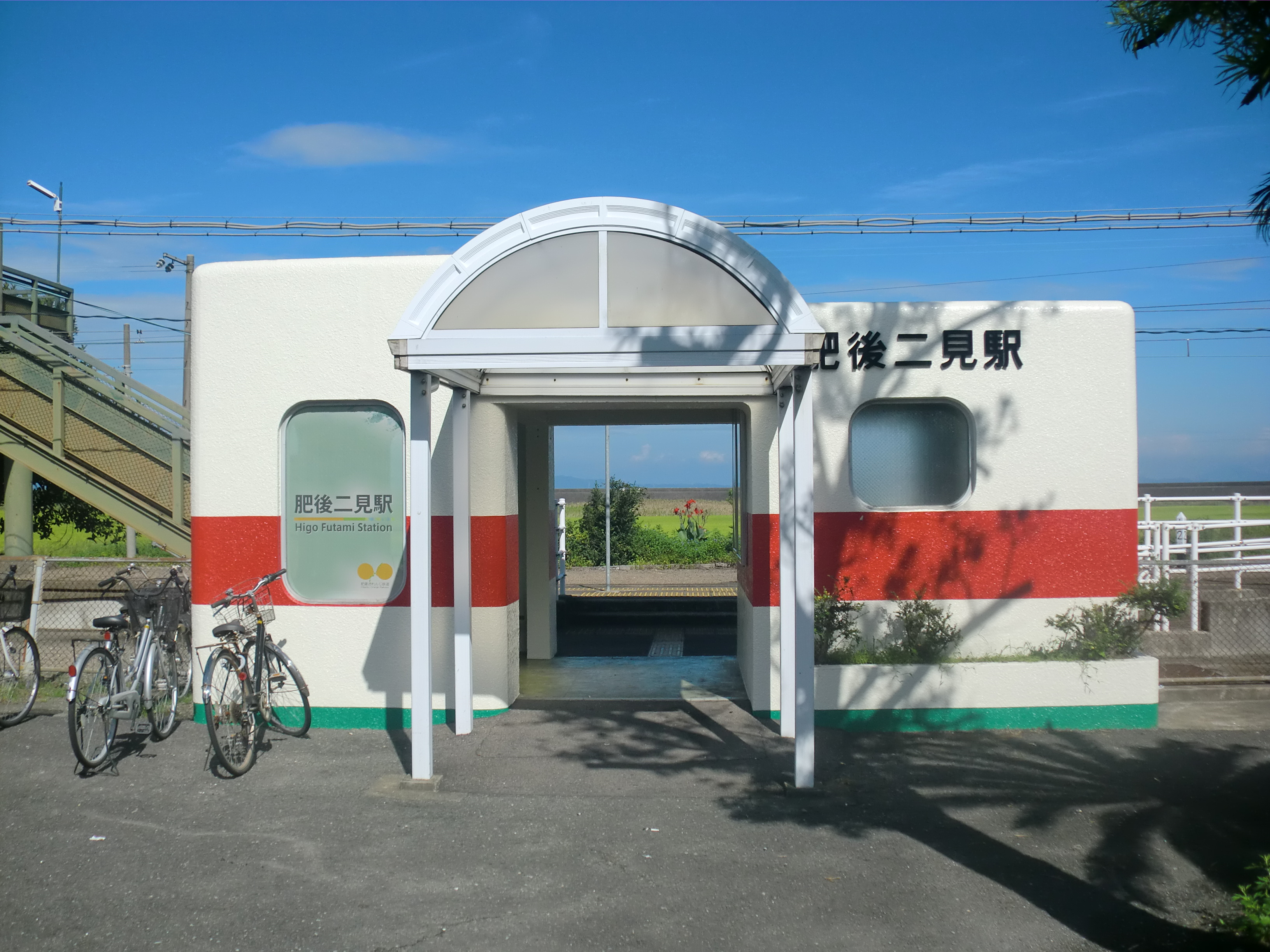 肥薩おれんじ鉄道 肥後二見（ひごふたみ）駅駅舎